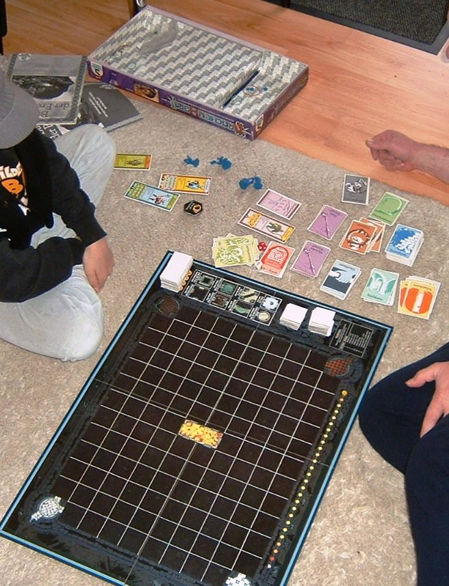 Drachenhort, Brettspiel aus dem Fantasygenre, Anfangssituation